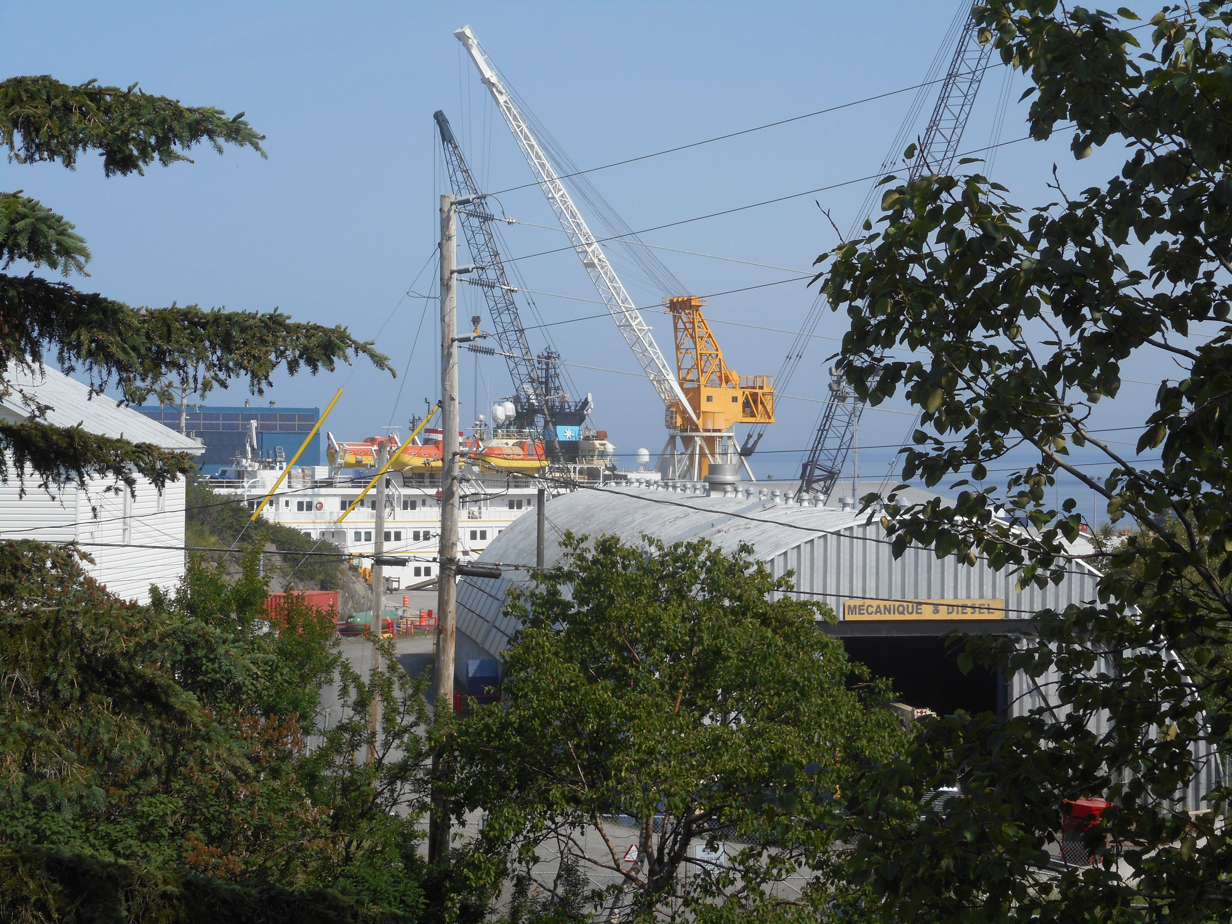 Verreault Navigation, 127, rue du Quai, Les Méchins